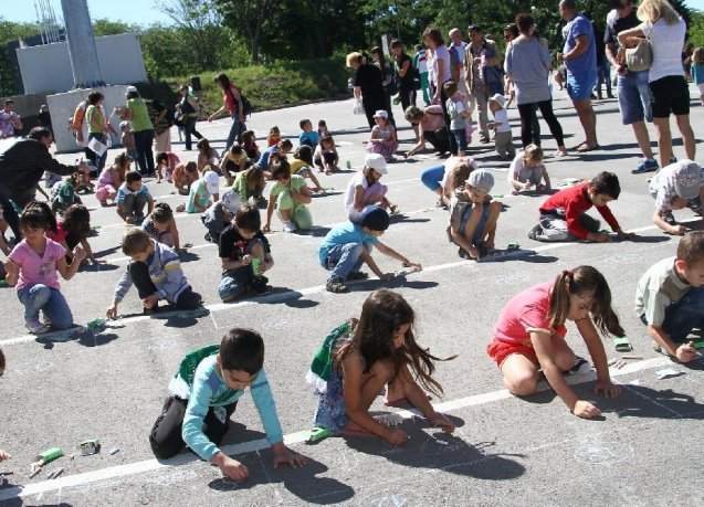 Това е конкурс ,който се провежда ежегодно на 1 Юни на метри от Лудогорец арена. Той е с безплатен вход. При лоши метереологични условия датата мже да се смени ,като такъв пример е 2014 ,когато конкурсът бе отменен за 5 Юни. Децата получават талончета за участие в томбола, наградите в която са предварително предвидени за най-добрите художници – пособия по рисуване, раници с герои от детски филмчета, артикули с логото на „Лудогорец“, няколко футболни топки. Жури ще отличи най-добрите творби. Близо 40 предметни награди раздадоха организаторите по възрастови групи. За малчуганите се раздават много награди, както всеки участник получава и по едно парче вкусна торта от "Лазаров" ООД. През 2017 година напрактика обаче подаръци имаше за всички присъстващи от 2 до 16-годишни малчугани – кутия с тебешири, парче вкусна торта, приготвена от фирма „Лазаров“ с украса от шампионски снимки на „Лудогорец“ и шестте спечелени купи от клуба, както и балони с логото на отбора. Всяко от децата, както и техните родители, имаха възможност и да се снимат до шампионската купа от последния сезон. Организаторите са ПФК „Лудогорец“ и дамския фенклуб “Green ladies” в партньорство с ОФК „Лудогорец“ и Центъра за работа с деца в Разград ВАЖНО! - Предварителните записвания правете в Центъра за работа с деца до 27 май, както и на телефон: 0878 54 28 07